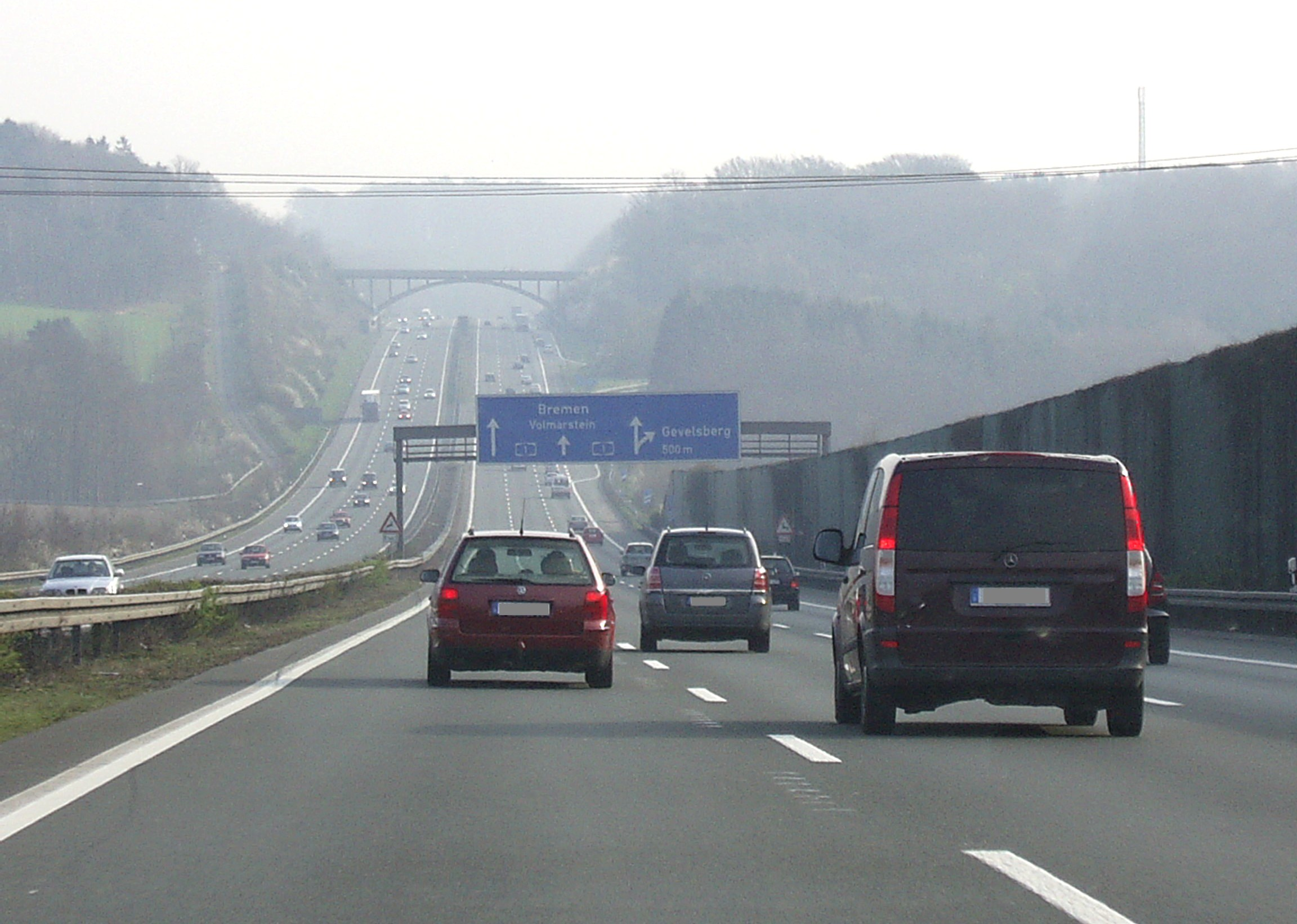 Bundesautobahn 1 Richtung Bremen vor Abfahrt Gevelsberg, Brücke Eichholzstraße (Gevelsberg-Silschede)